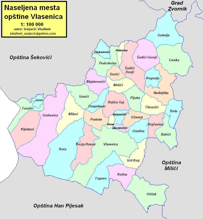 Opština Vlasenica